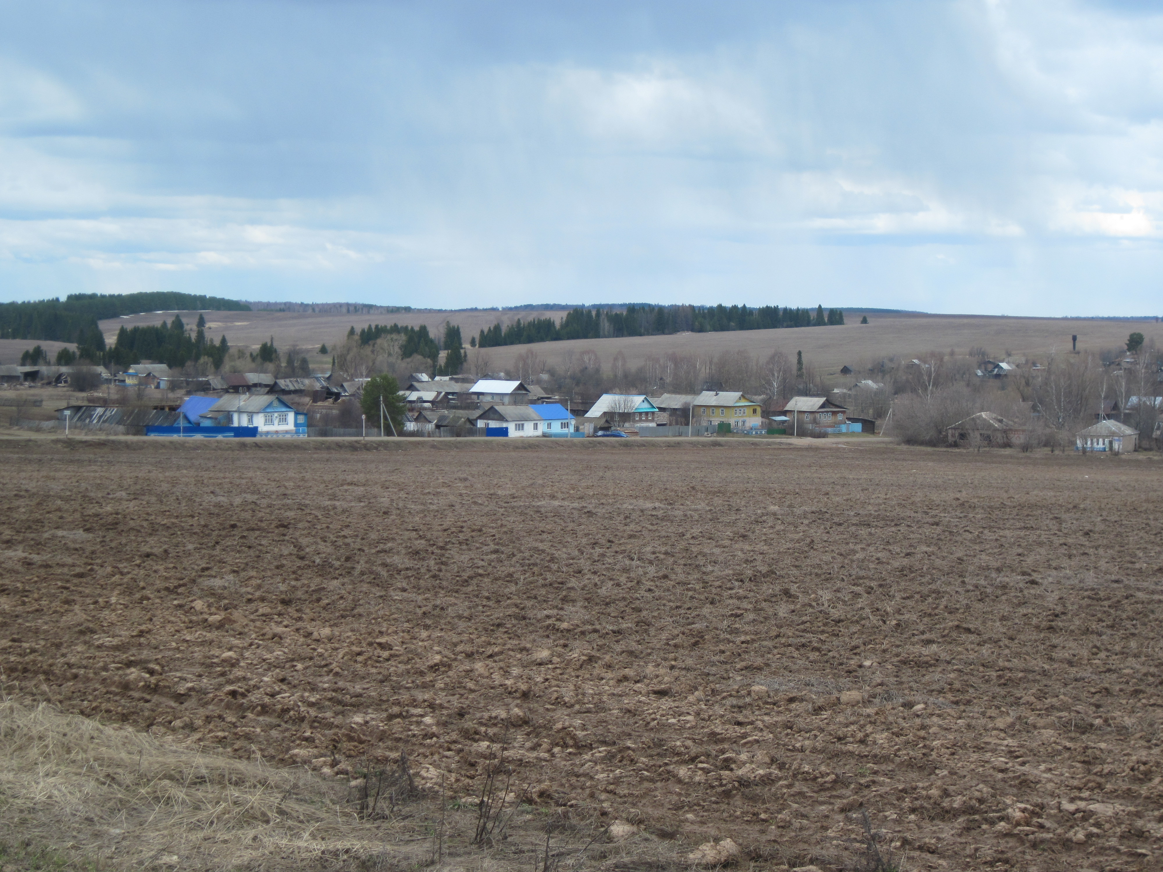 Увинский район Удмуртии